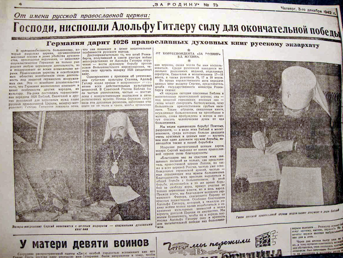 Газета «За родину» — оккупационная немецкая газета выходившая с осени 1942 года до лета 1944 года. «Пастыри и оккупанты, часть 2» Радио «Свобода» от 06.01.2012, исследователь из Мюнхена Игорь Петров: «В сети можно увидеть вырезку из псковско-рижской газеты "За родину" декабря 42-го с фотографиями Сергия и с такой "шапкой": "От имени Русской православной церкви. Господи, ниспошли Адольфу Гитлеру силу для окончательной победы».